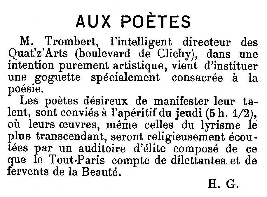 Annonce de la création d'une goguette dédiée à la poésie au Cabaret des Quat'z'Arts boulevard de Clichy.